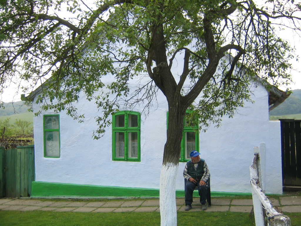 Bătrân în fața casei în satul Bogda, jud. Timiș